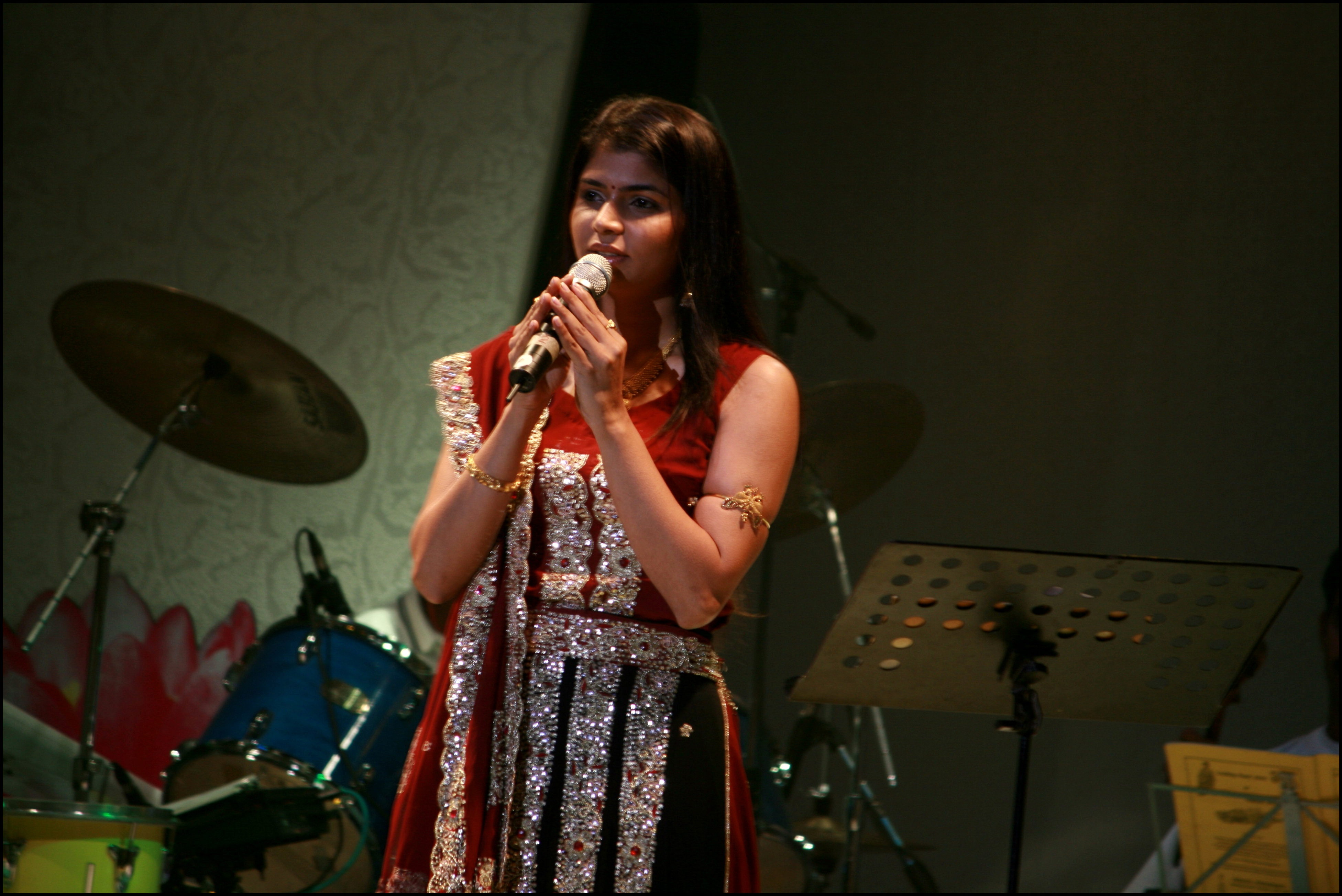 Indian playback singer Chinmayi Sripada in 2008